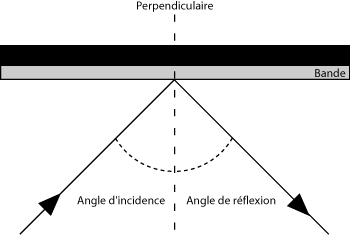 Billard - Réaction naturelle des bandes - Travail personnel, libre de droit